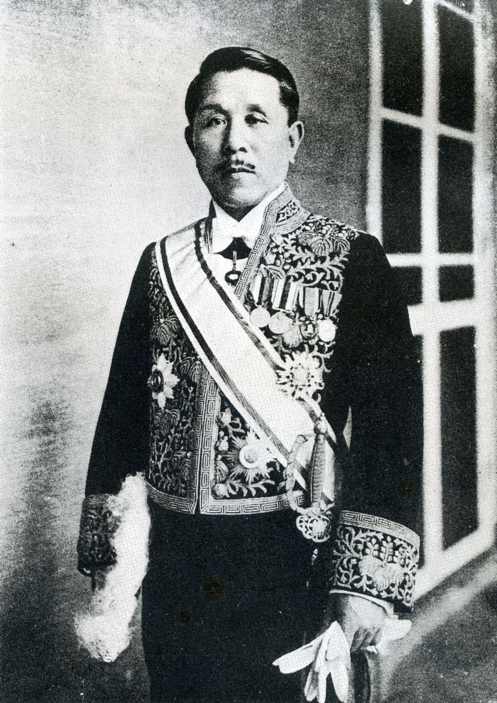 この写真は、広田弘毅（1878-1948）の外務大臣時代の写真です。